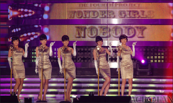 농심 협찬 제9회 '2008 사랑나눔콘서트'